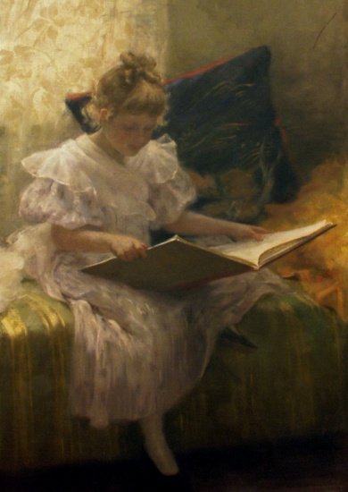 Mädchen mit Buch, Öl auf Leinwand, 106 x 67 cm; Residenza della Republica, Quirinale, Roma